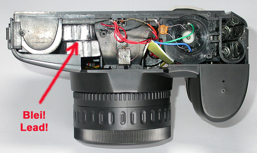 Bleigewichte in einer Canomatic-Kamera